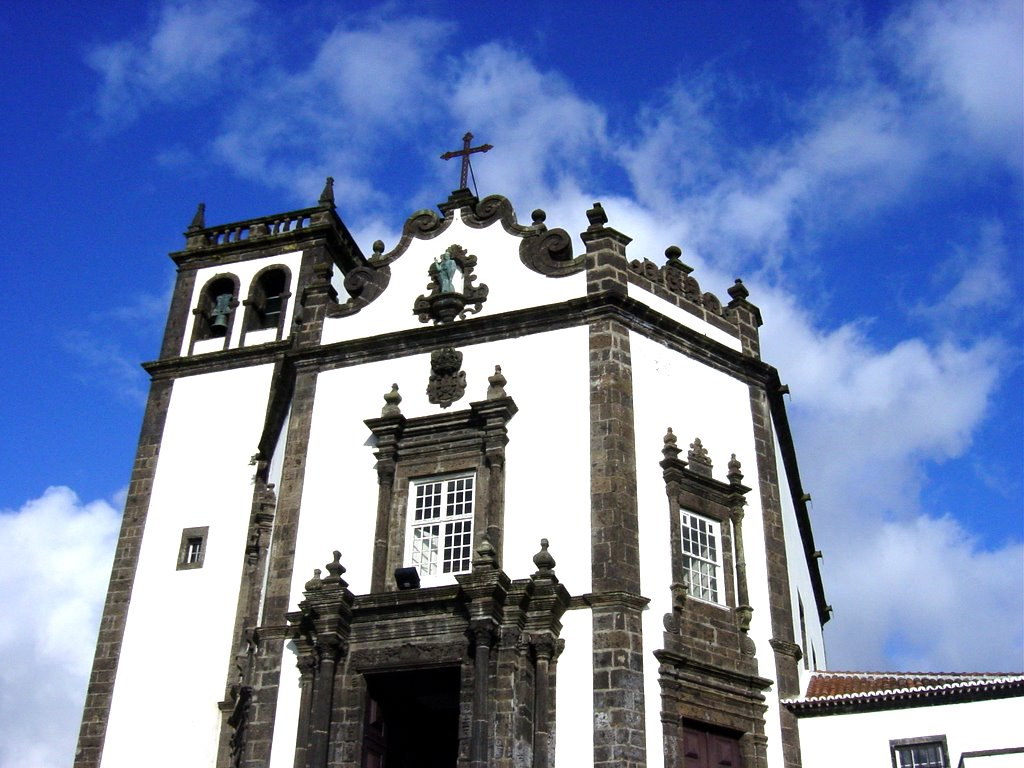 Azores - S. Miguel